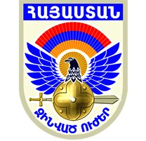 ՀՀ ԶՈՒ զինանշանը